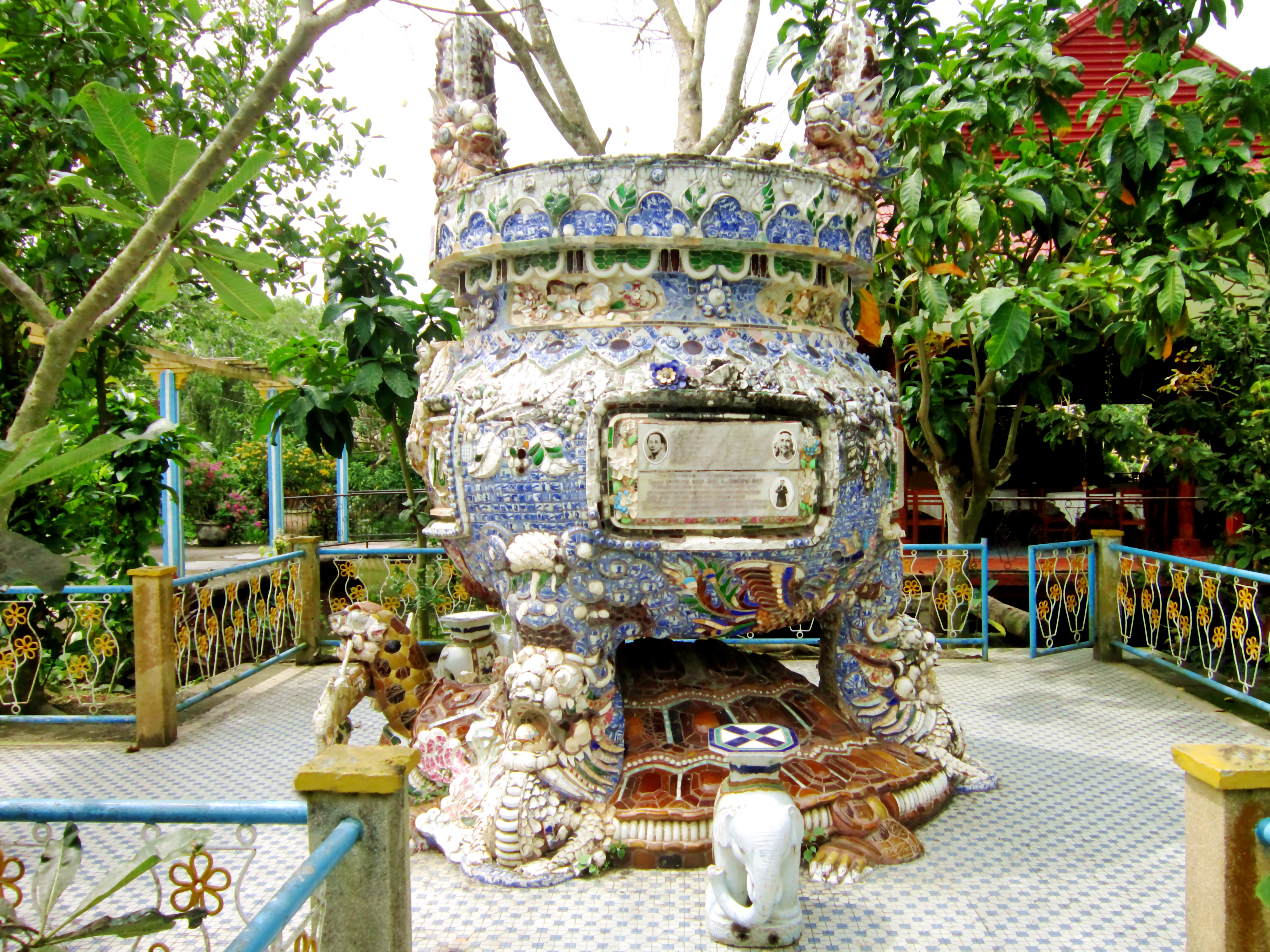 Đỉnh lớn được đúc bằng xi măng cốt sắt với những mảng đắp bằng sành sứ, ở nơi hành đạo (cồn Phụng, Bến Tre, Việt Nam) của ông Đạo Dừa (Nguyễn Thành Nam, 1909-1990) trước 1975. hiện ở cồn Phụng trên sông Tiền, nay thuộc tỉnh Bến Tre, Việt Nam.